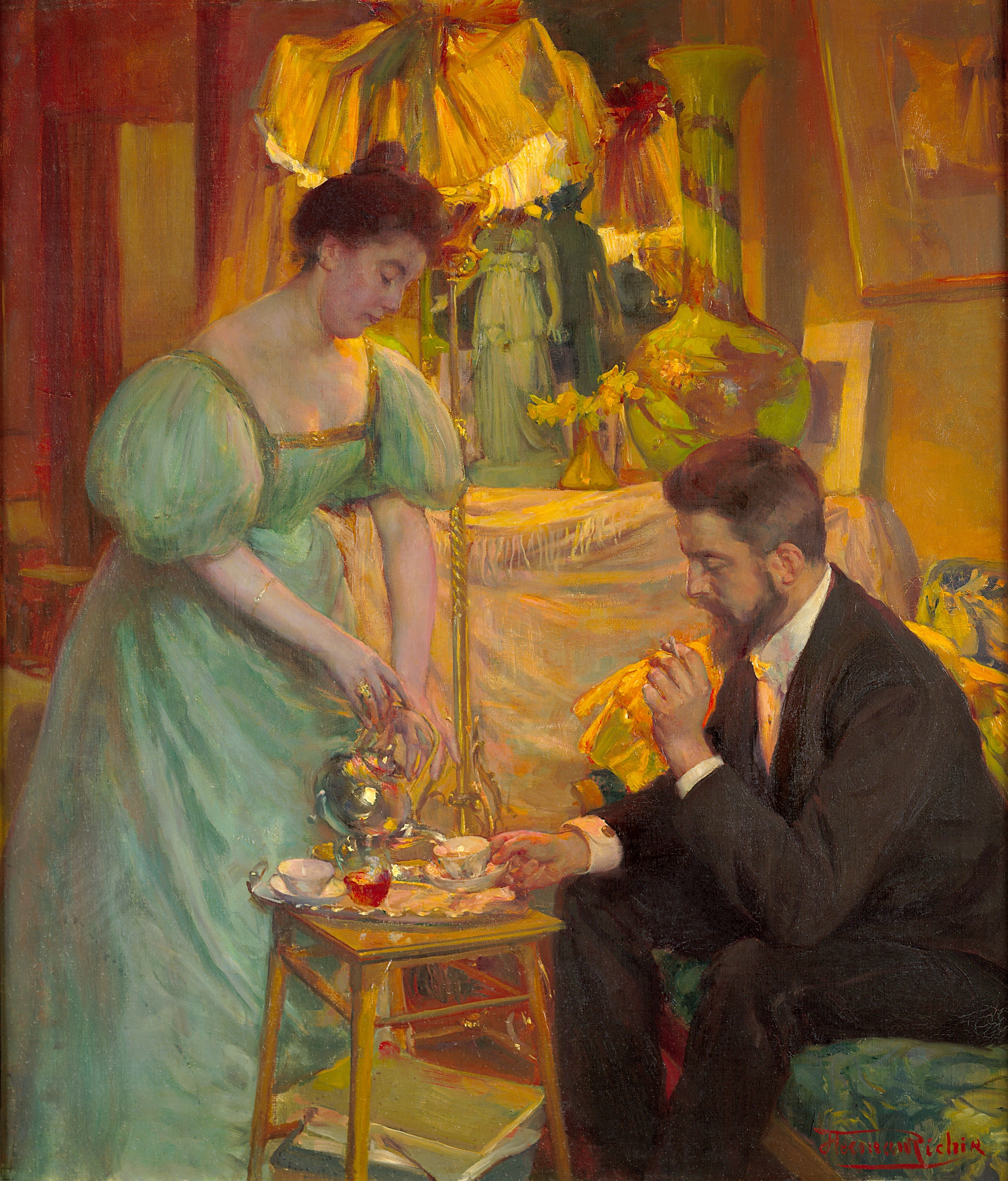 Le thé (Les peintres Juliette et Rodolphe Wytsman)